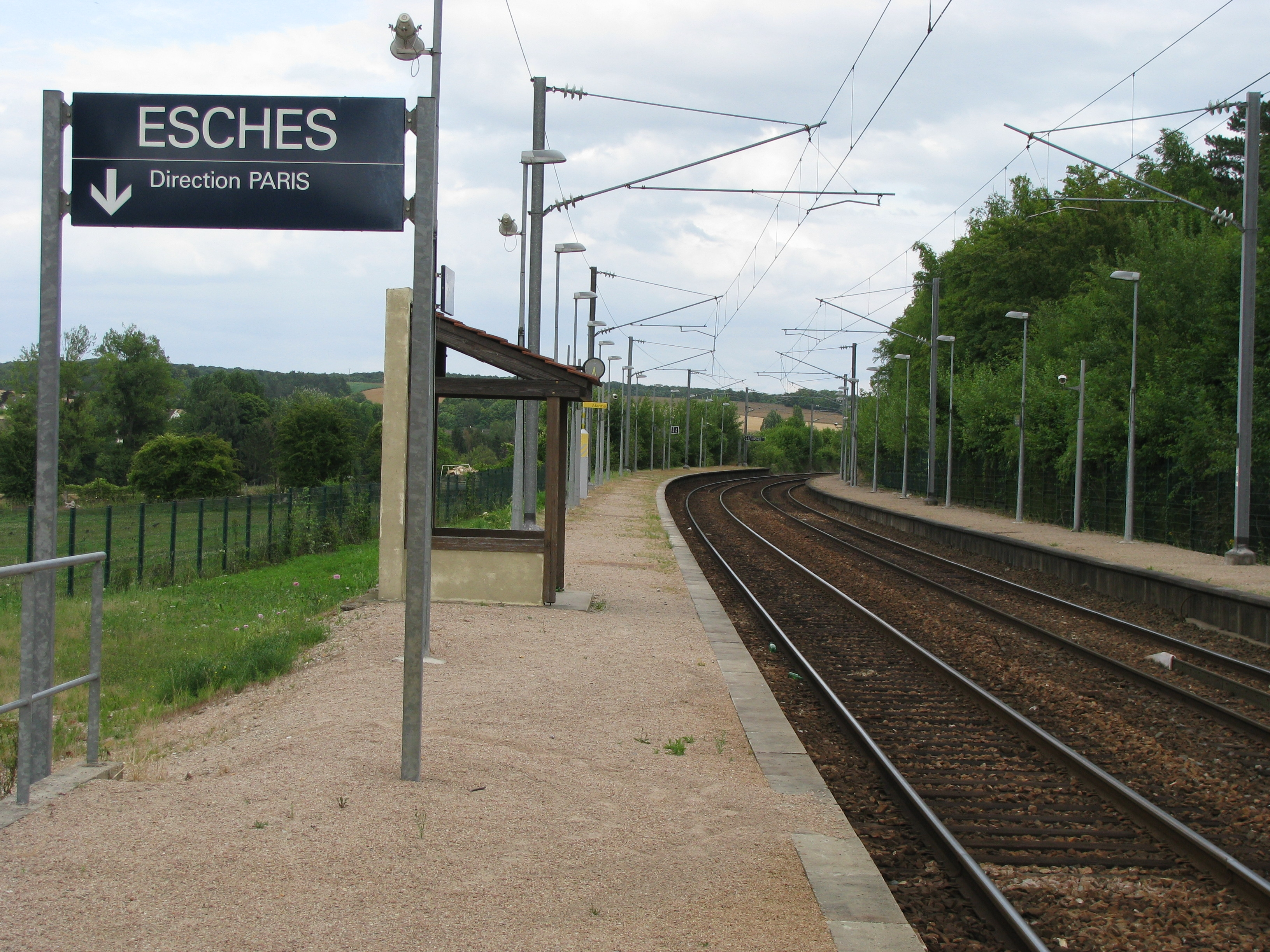 Gare d'Esches, 60110 Oise, Picardie